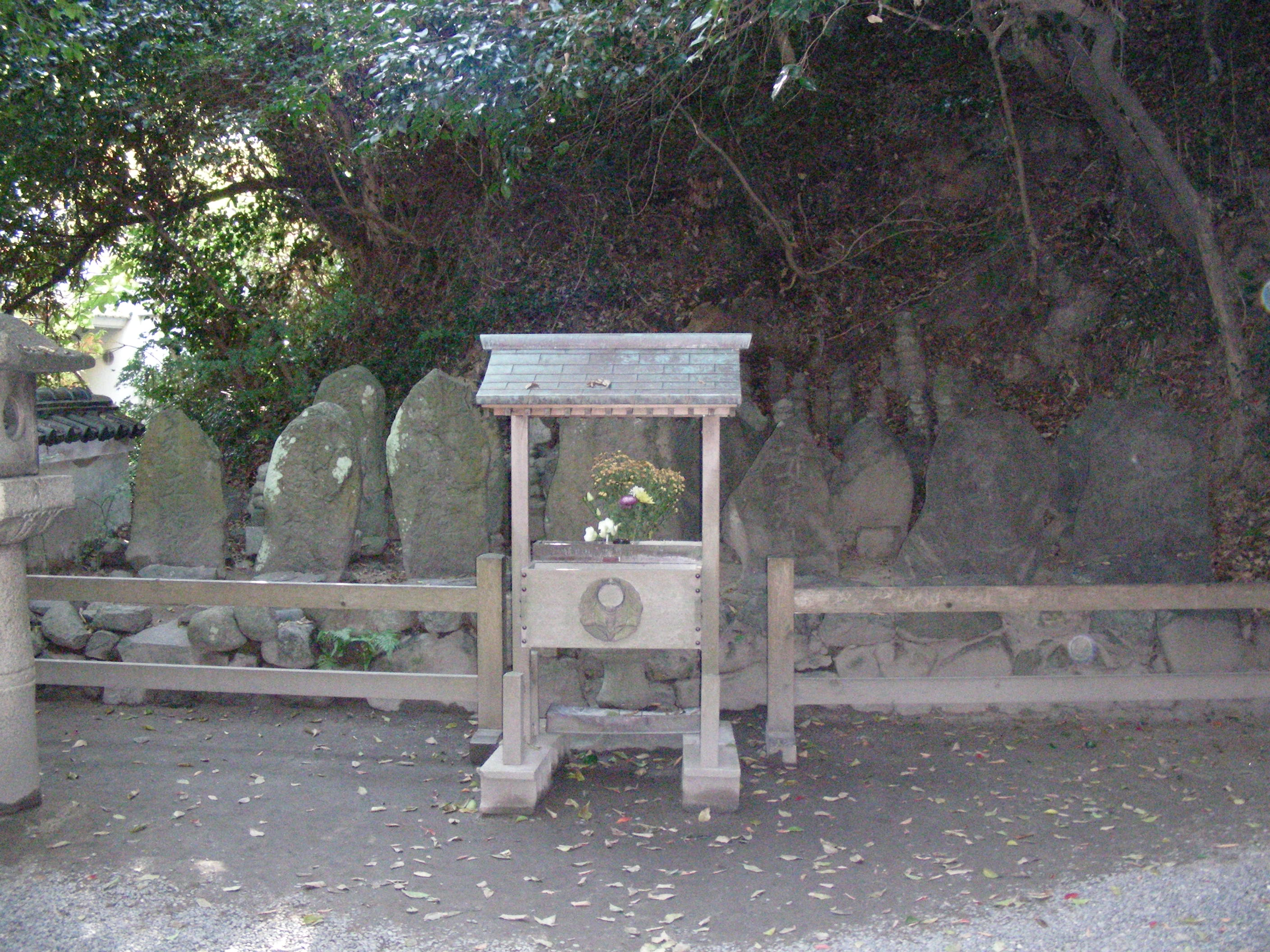 山口県下関市赤間神宮境内の七盛塚。2007年11月投稿者撮影。